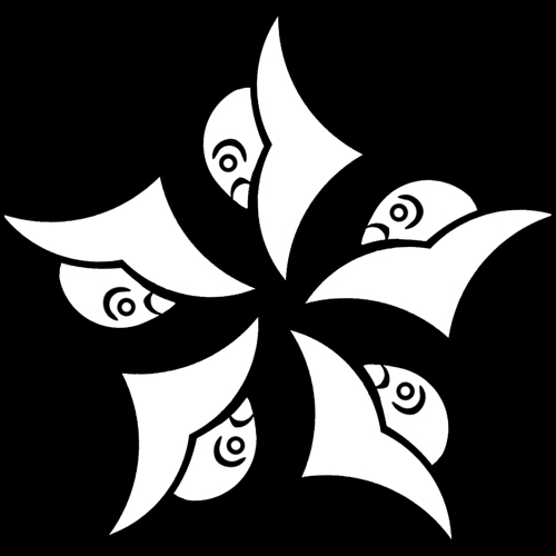 「五つ雁金」紋（染抜）